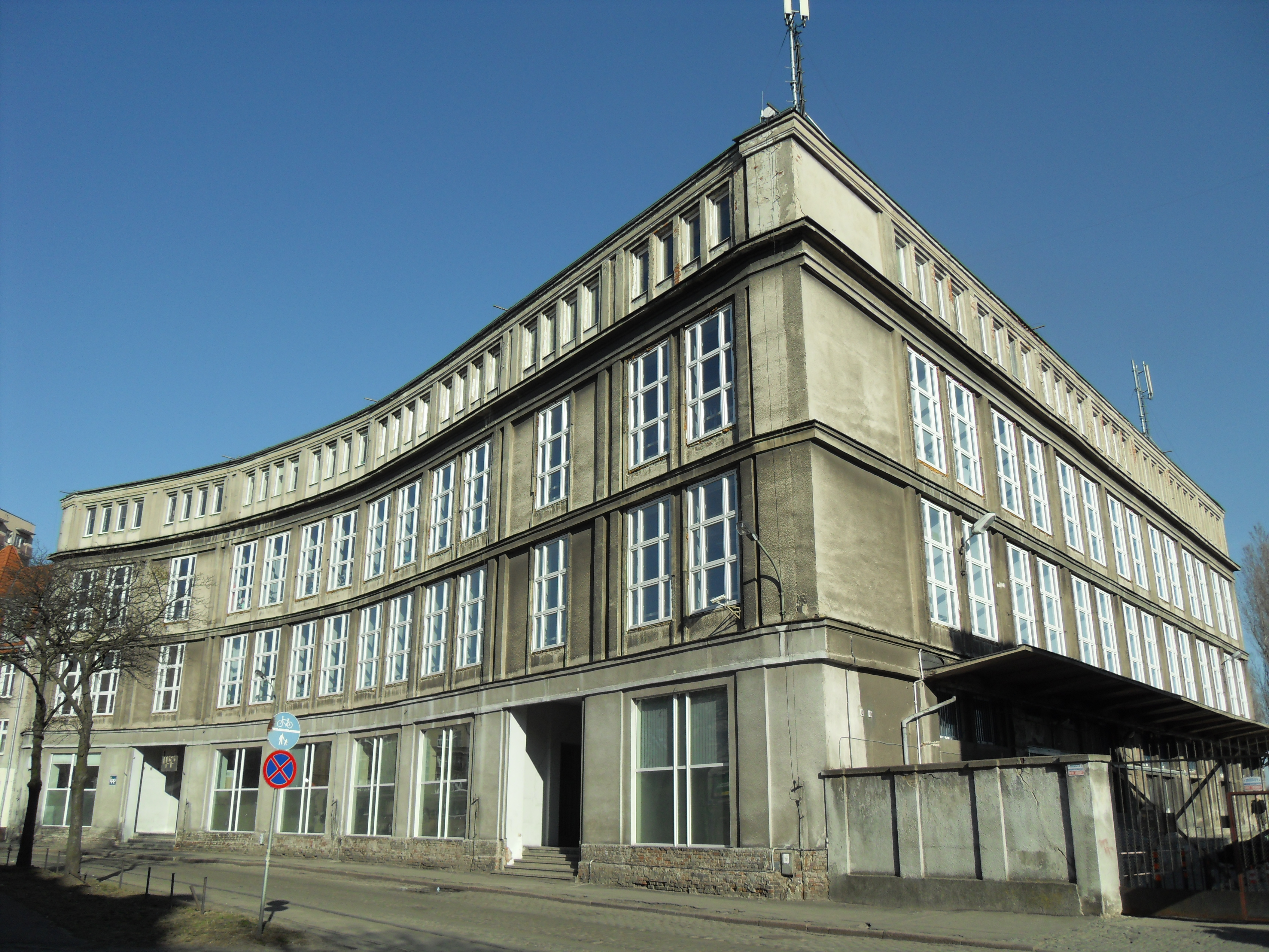 Gdańsk Dolne Miasto, ul. Łąkowa 39-44 - biurowiec firmy odzieżowej LPP (zbud. 1924-1927).